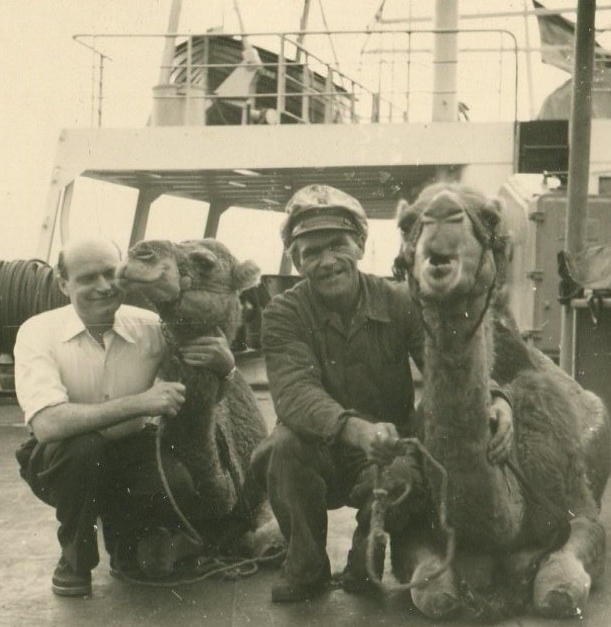 Ankunft der Kamele im Hamburger Hafen, die Willi Bartels König von St. Pauli für sein Lokal Hippodrom mit dem Schiff Algimib aus Afrika geholt hat.